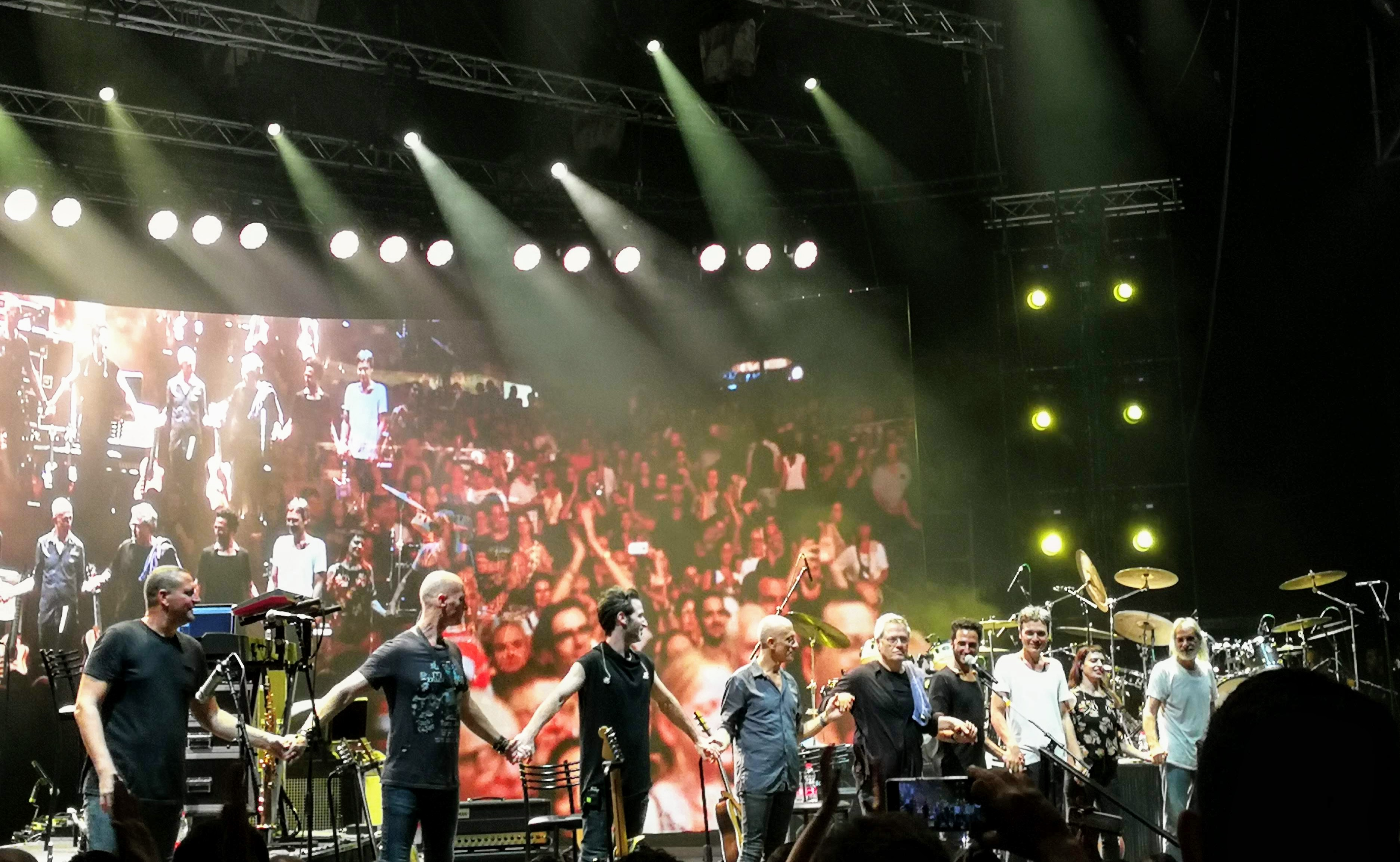 שלמה ארצי בהופעה באמפי פארק רעננה, סוכות, ספטמבר 2018